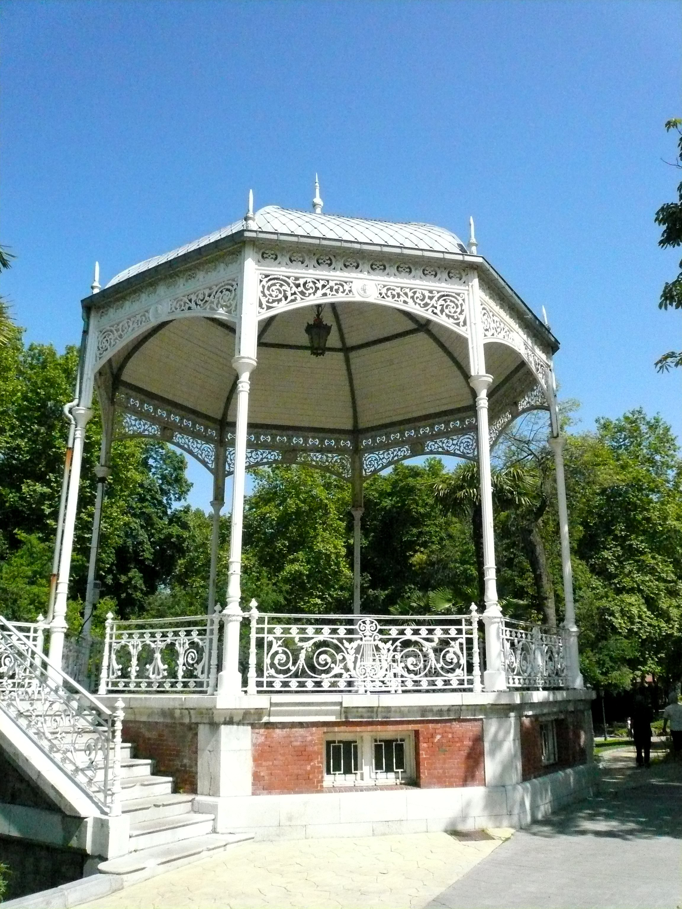 quioscomusica